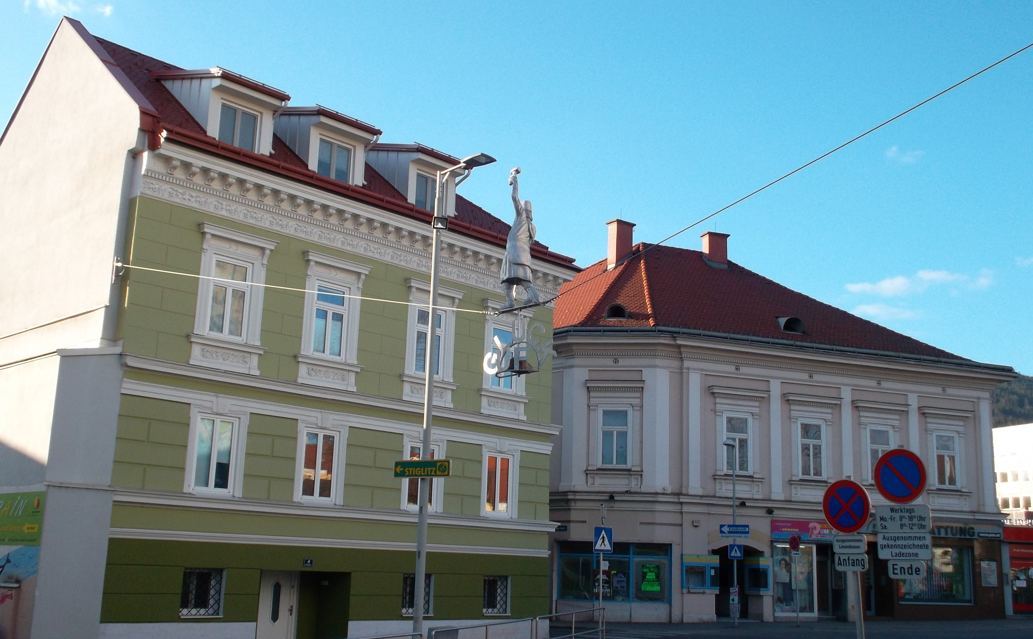 Skulpturo en Leoben, kiu montras ministon.